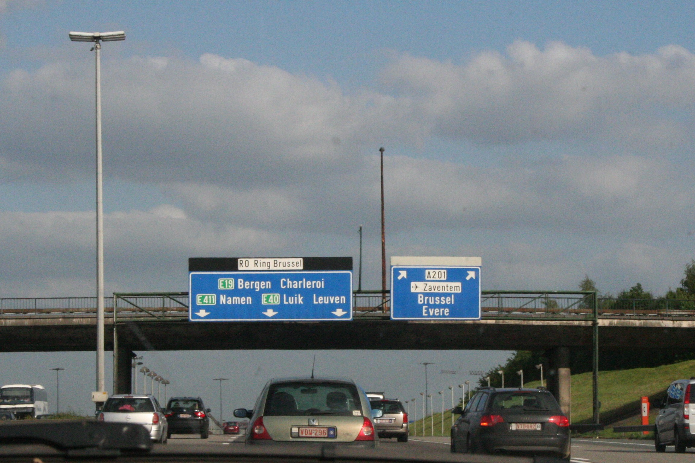 A201xRO